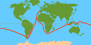 Journey of Louis Antoine de Bougainville 1766 - 1769